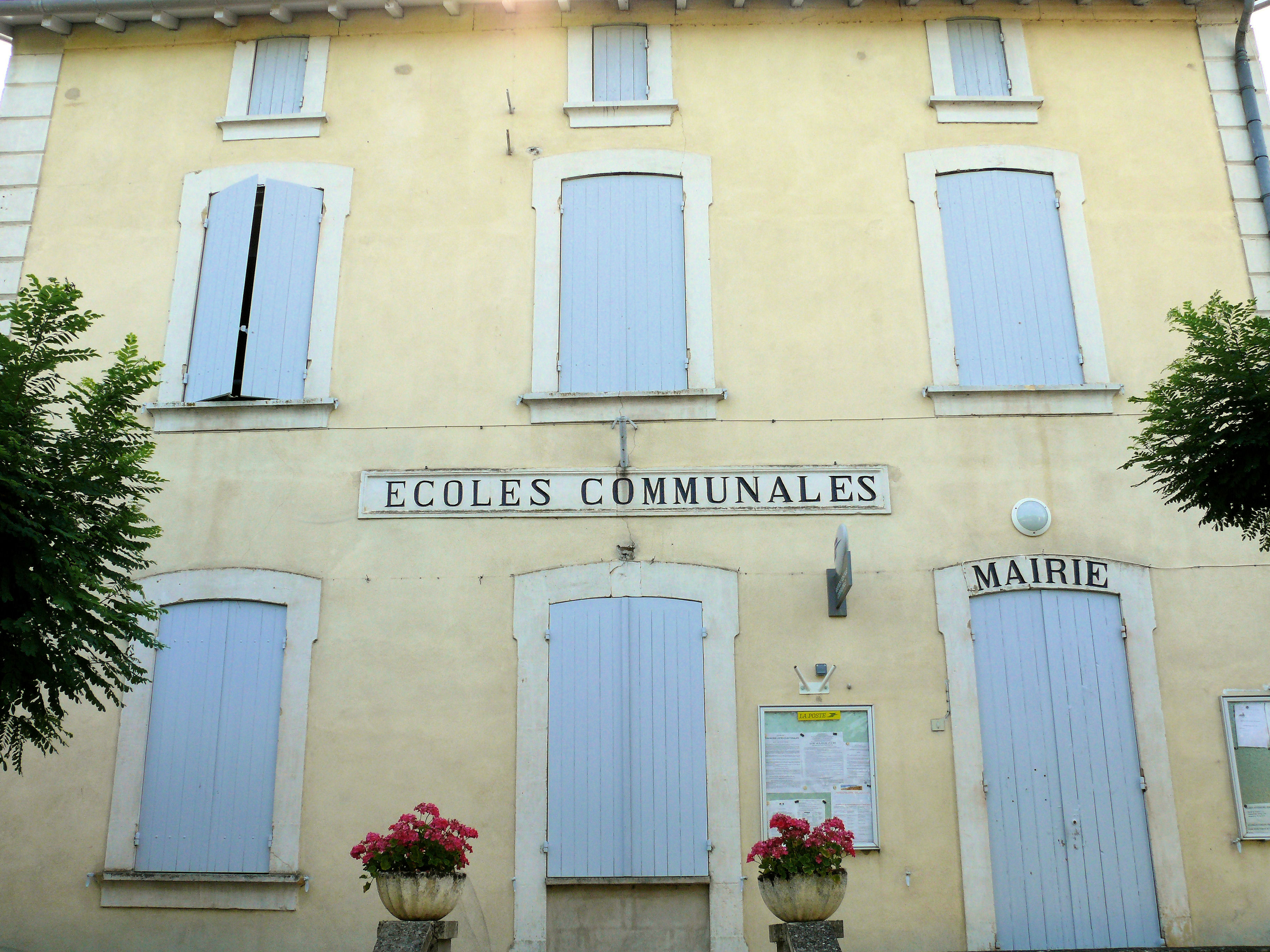 Montagnac-sur-Lède - Mairie